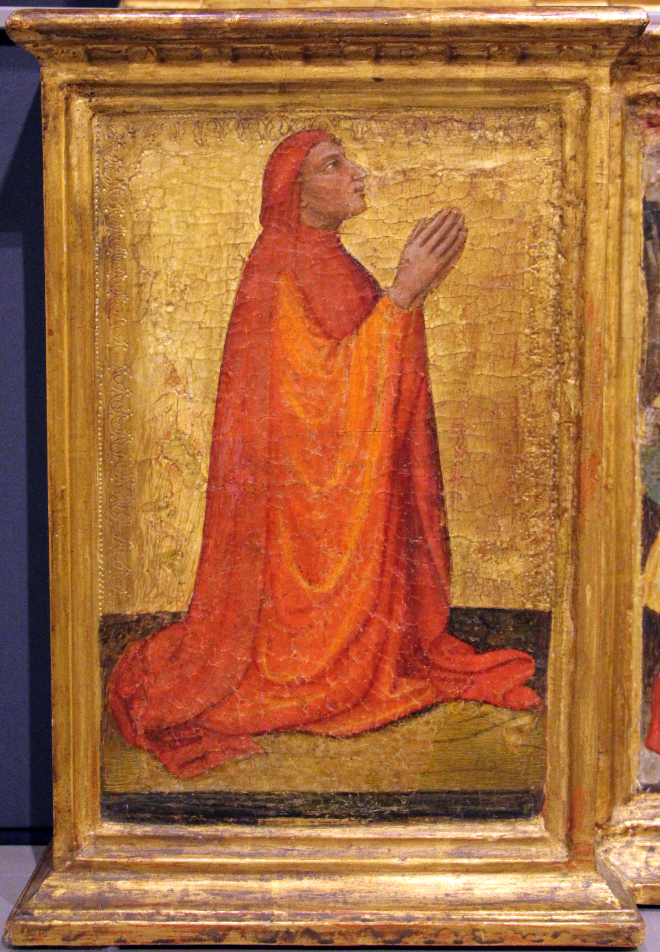 Museo civico (Prato) This is a photo of a monument which is part of cultural heritage of Italy.